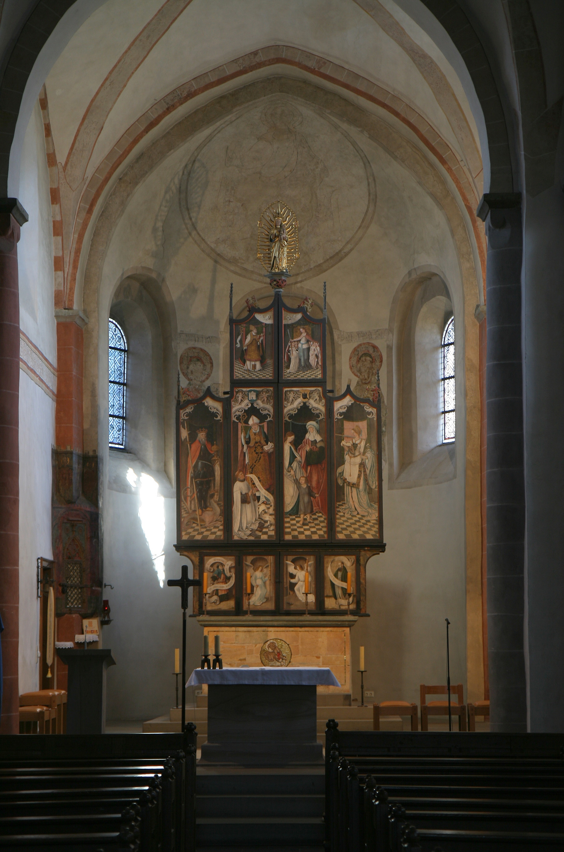 Spätgotischer Antwerpener Altar (geschlossen) im hohen Chor in der denkmalgeschützten katholischen Pfarrkirche St. Lambertus in Neuenrade-Affeln, Hauptstraße 5.Spätromanische Hallenkirche, erbaut Mitte des 13. Jahrhunderts.